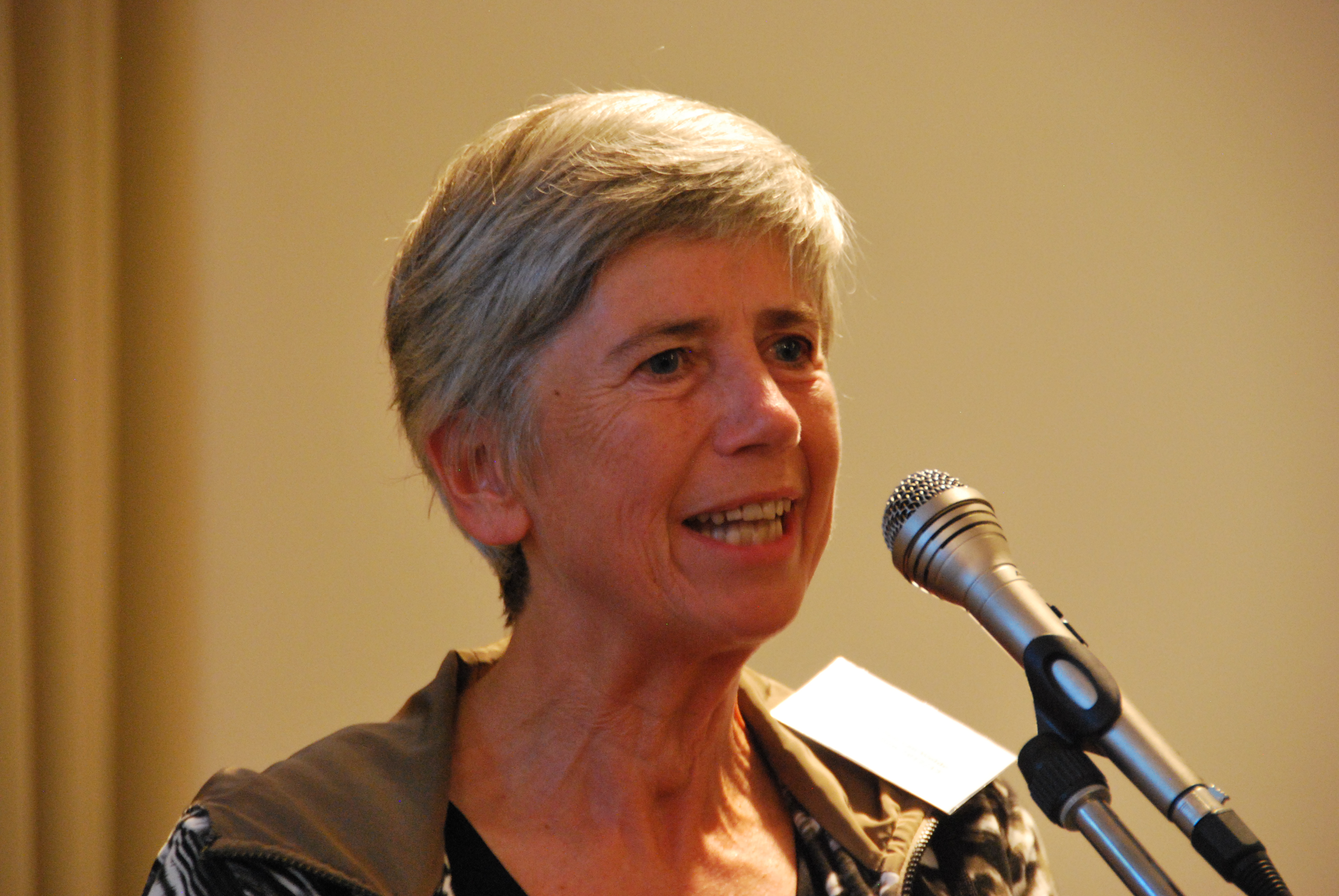 Ellen van Wolde